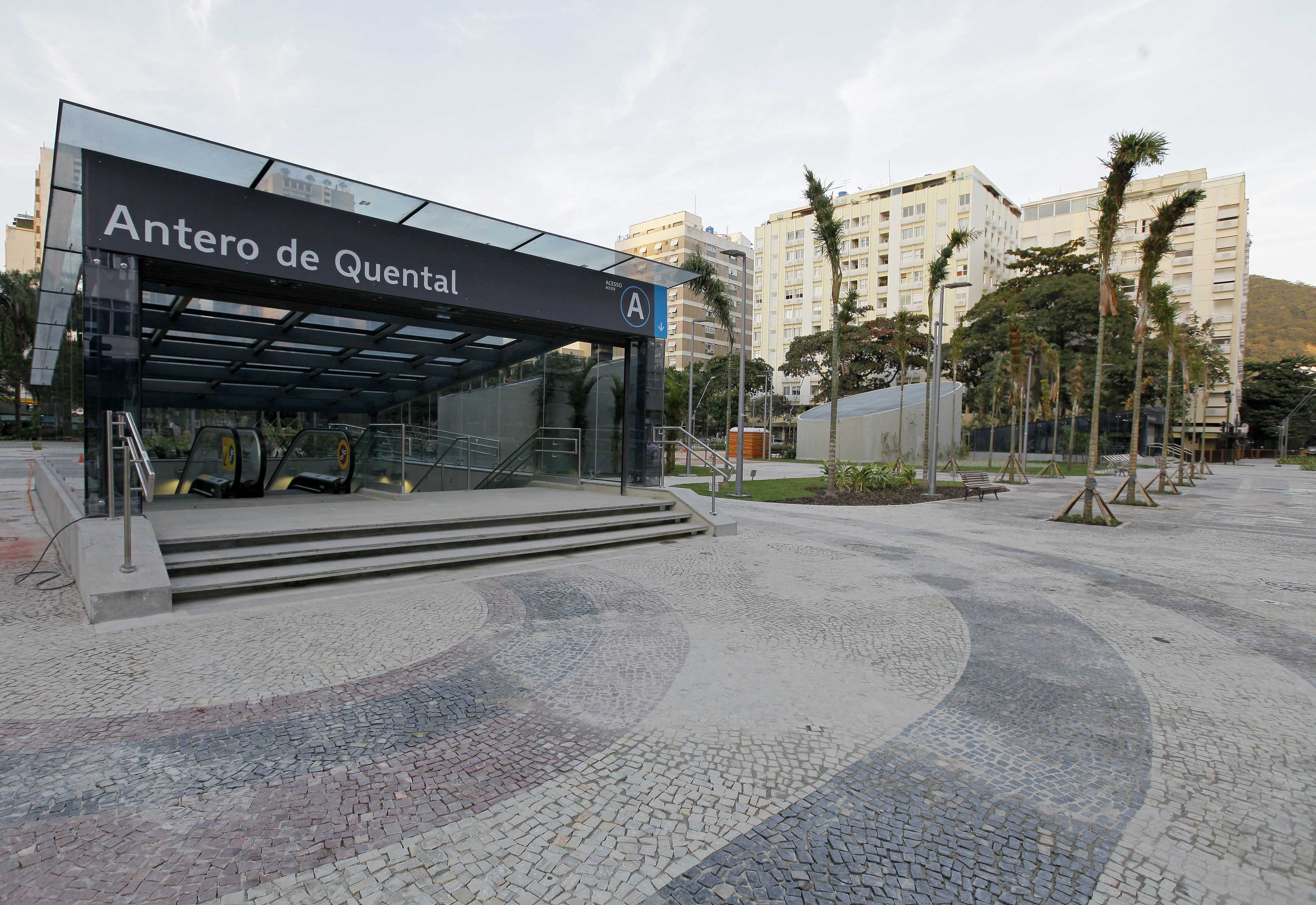 Estação Antero de Quental, no dia da inauguração no Leblon, Rio de Janeiro-RJ.